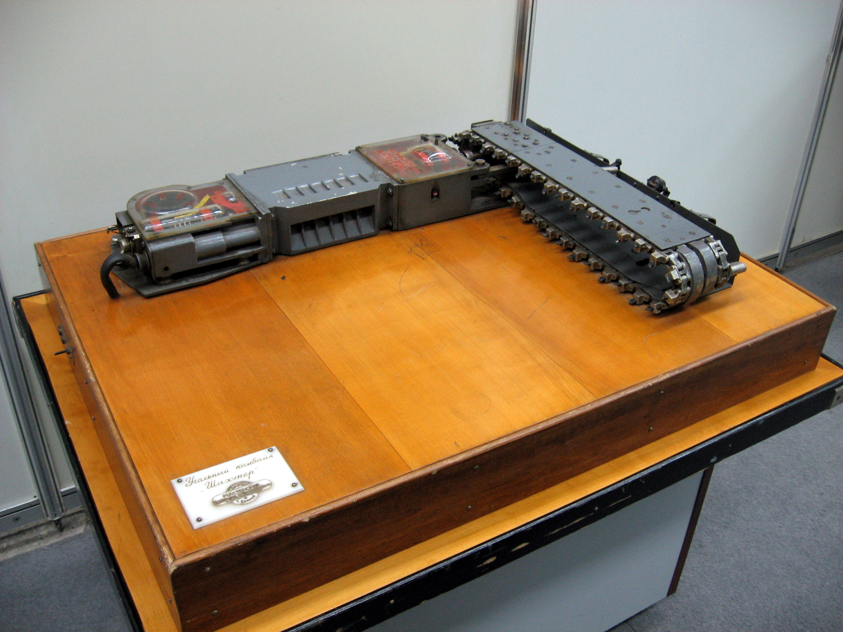 Фото з виставки Вугілля-Майнінг 2010